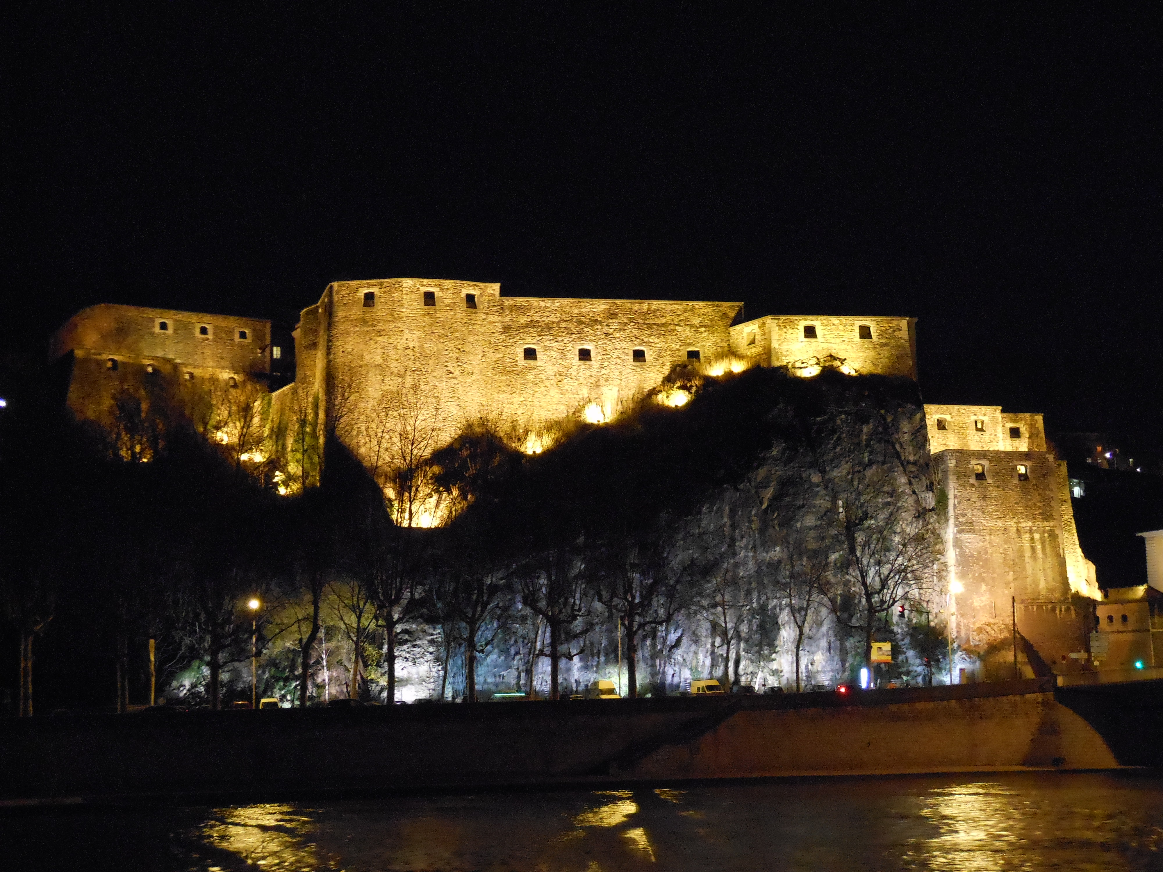 Le fort Saint-Jean de Lyon éclairé de nuit.